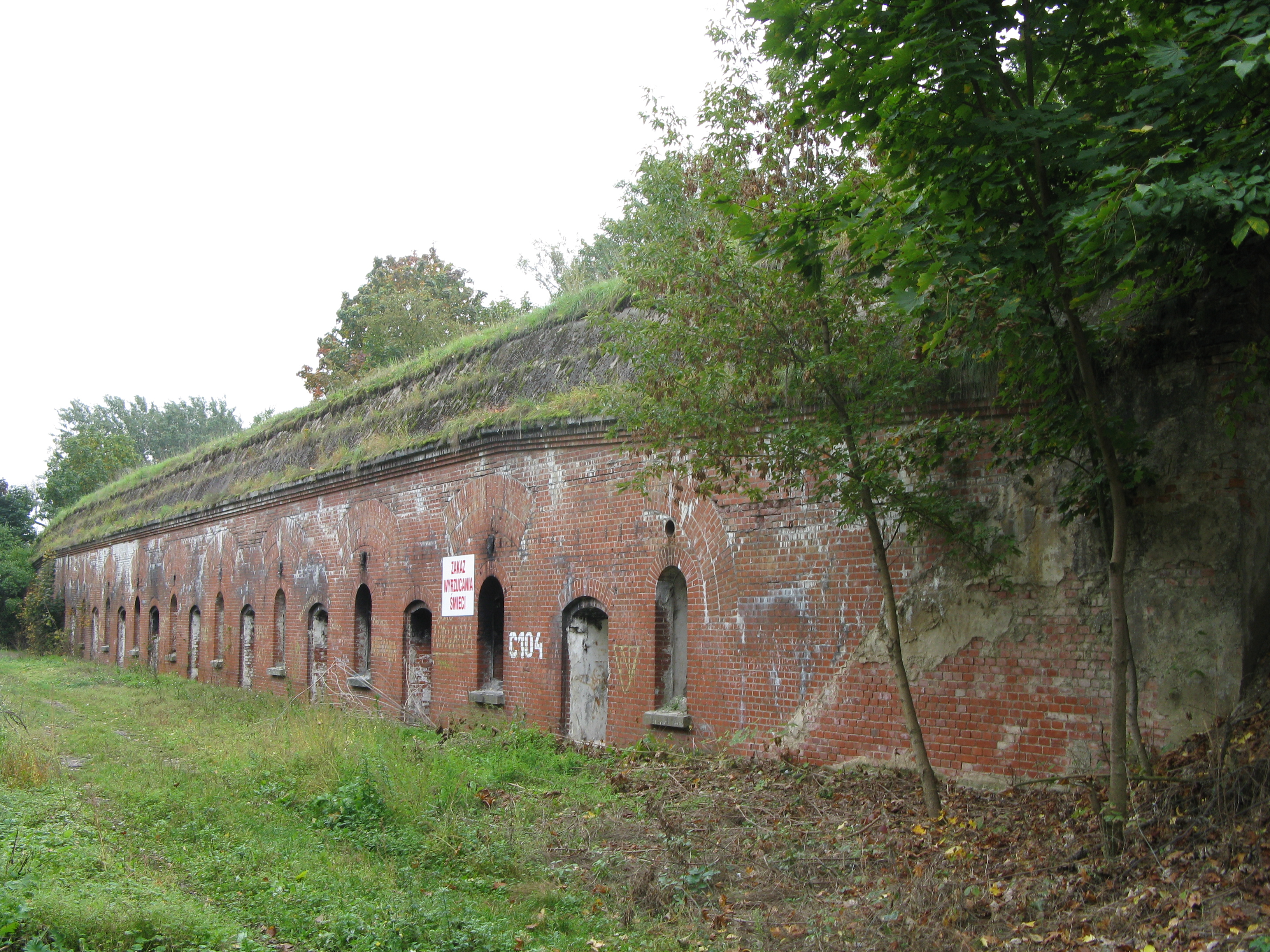 Fort X Twierdzy Toruń Fort Nr. X in Thorn